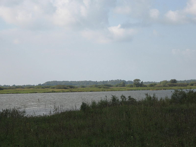 Nemunas. Už Paleičių kaimo